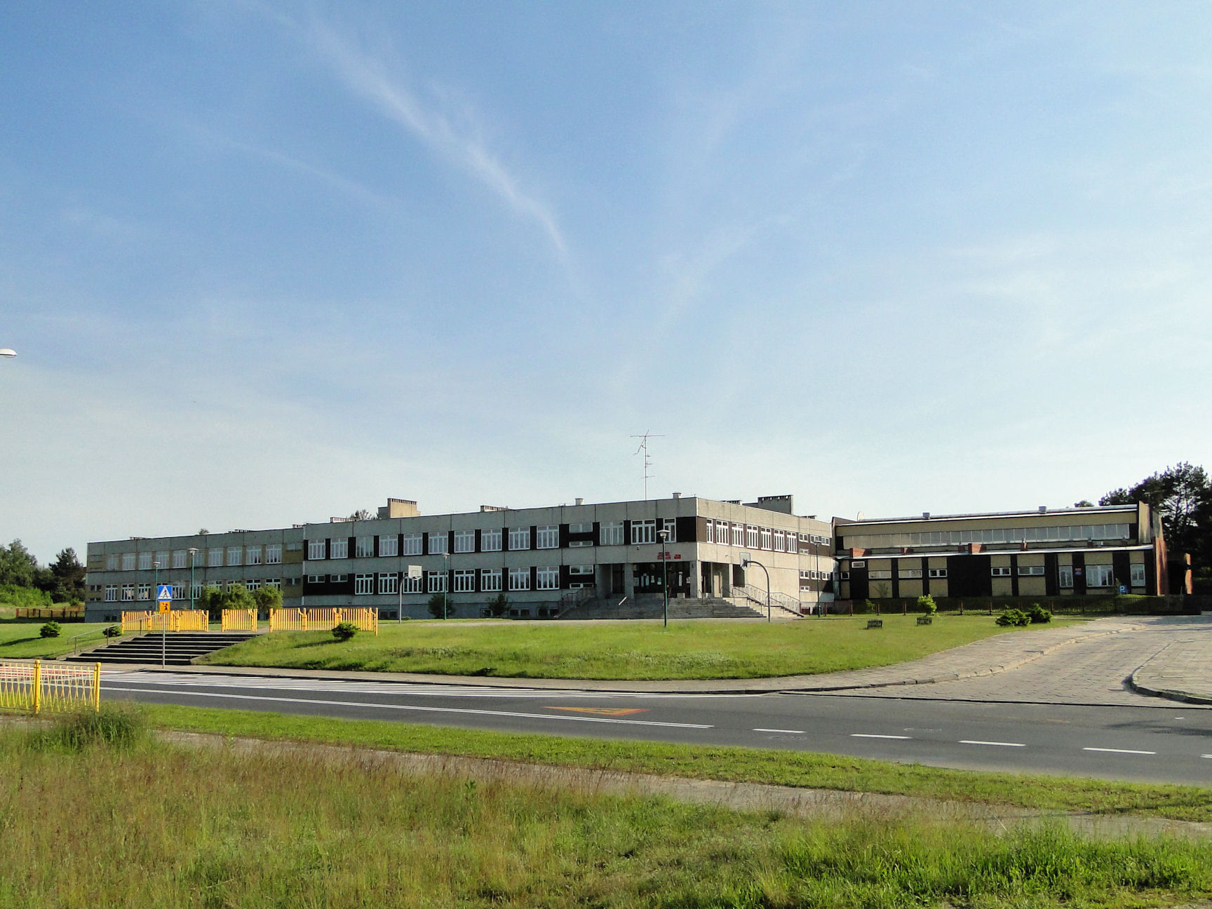 Szkoła przy ul. Piasecznej w Szczecinie Płoni